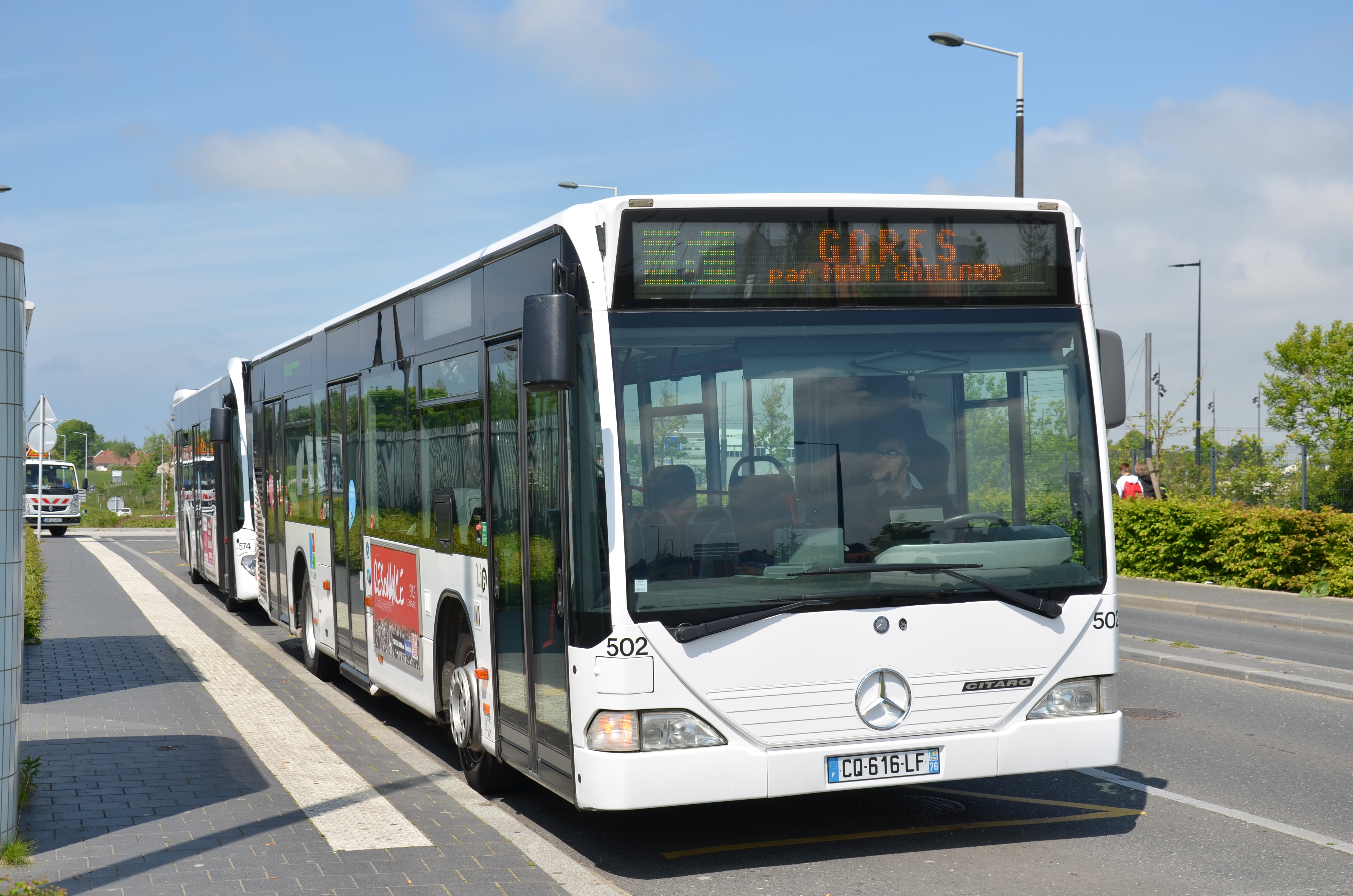 Mercedes Citaro n°502 sur la ligne 6 du réseau LiA, à son terminus Grand Hameau.